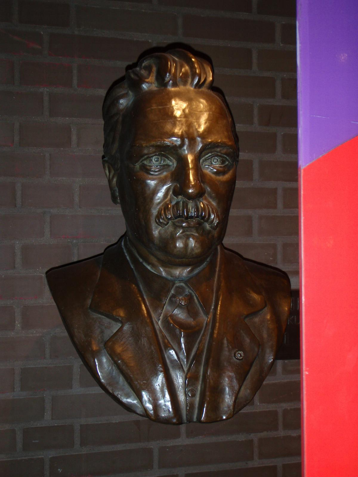 Rotterdam, de Doelen. Kunstwerk "Anton Verheij van Han Rehm. Rotterdam/The Netherlands.